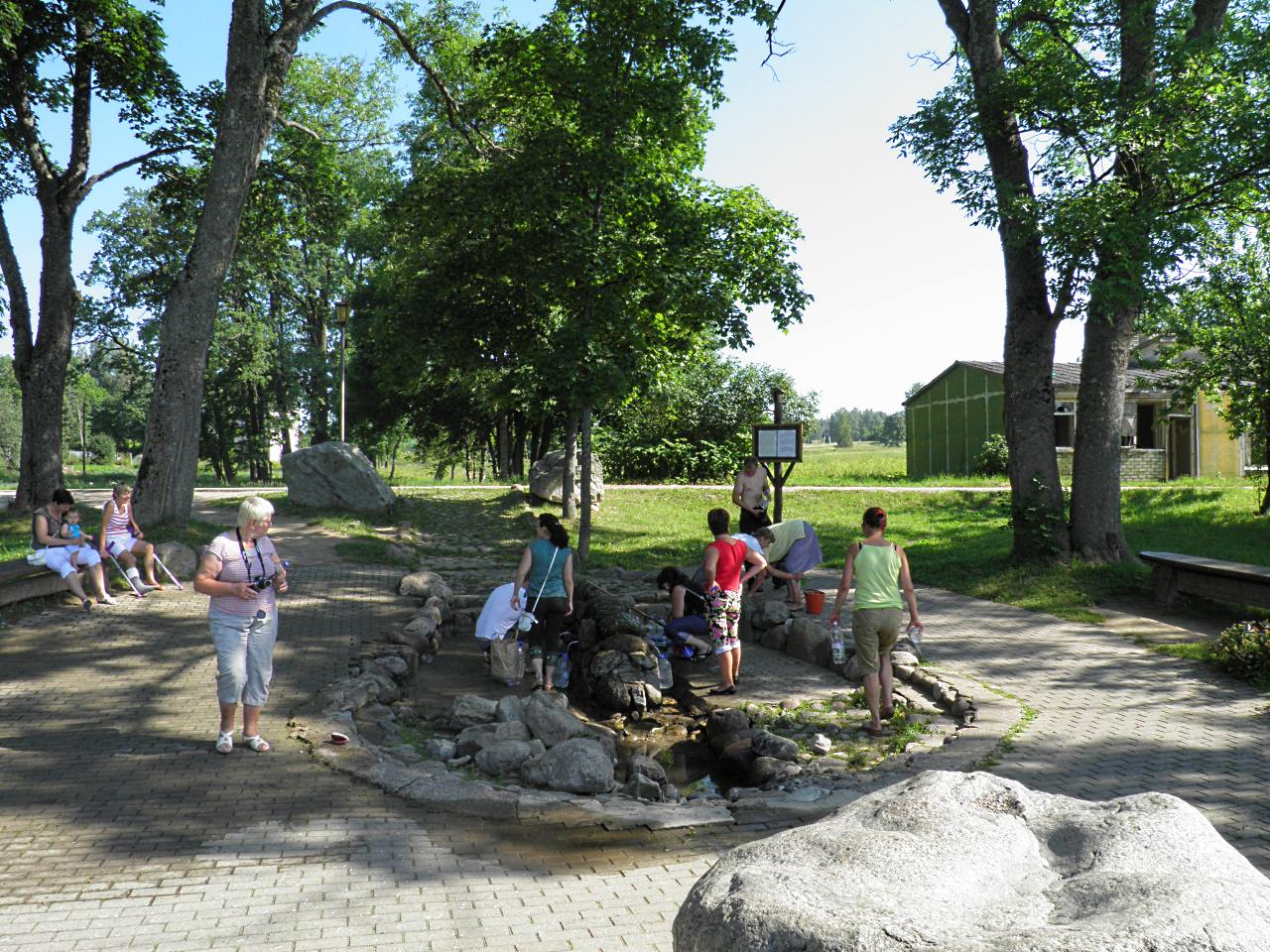 Святой источник